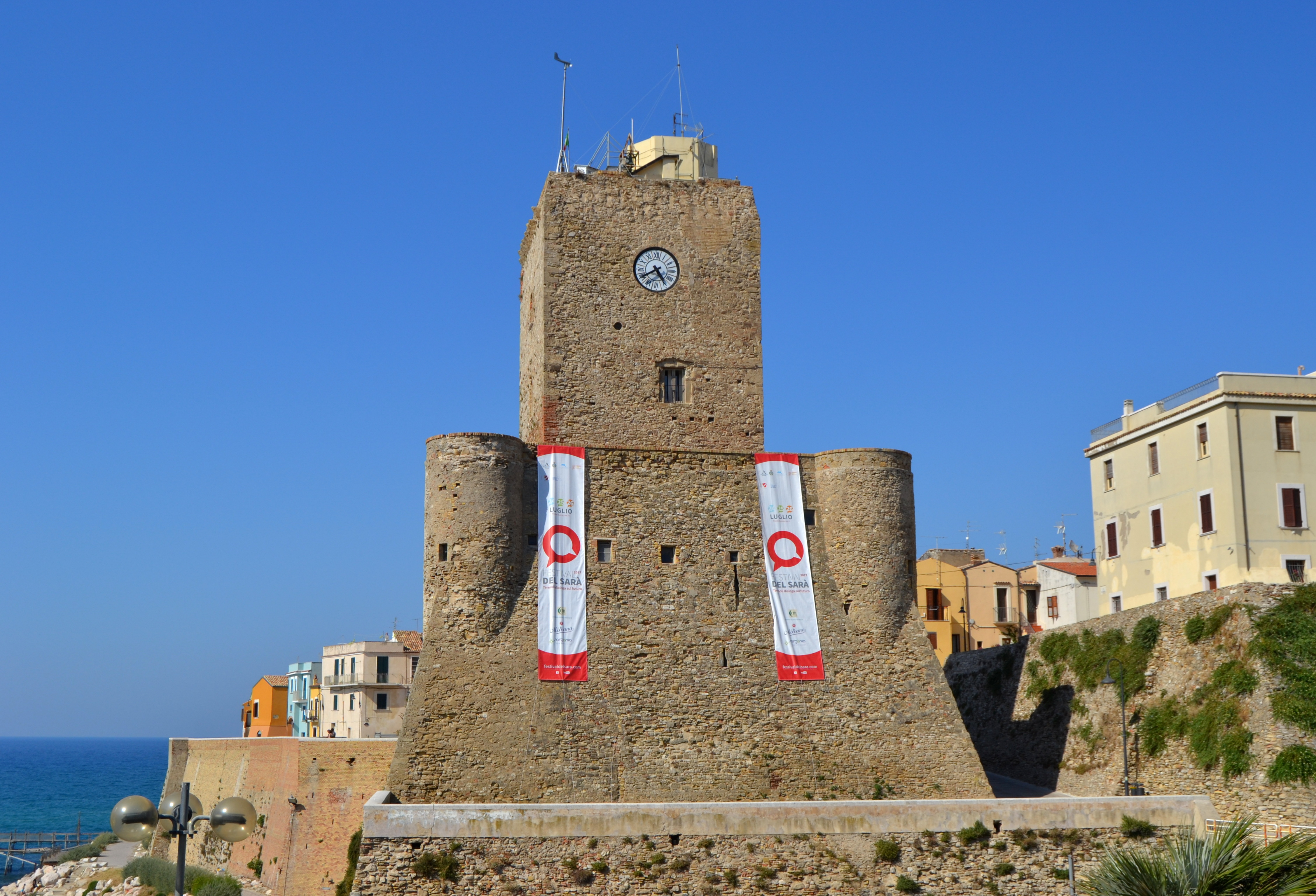 castelo svevo a Termoli